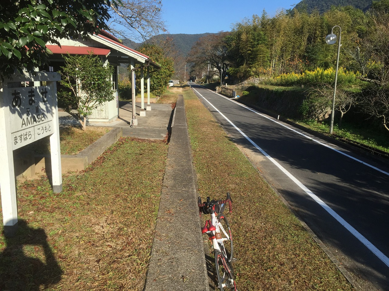 岡山県道703号備前柵原自転車道線 旧同和鉱業片上鉄道 岡山県 天瀬駅